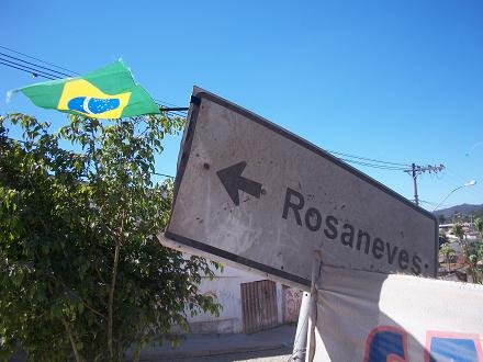 Placa de Orientação de Destino do Rosaneves com Bandeira do Brasil